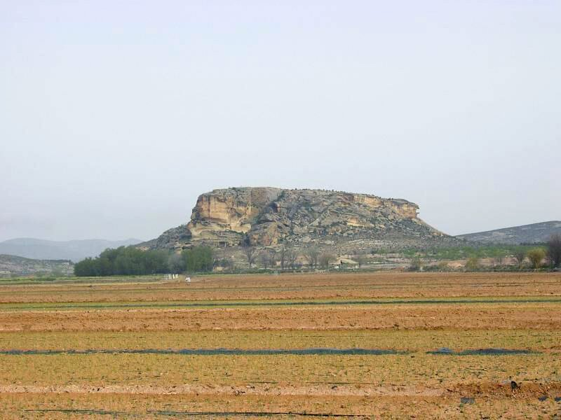 Fotografía del Tolmo de Minteda